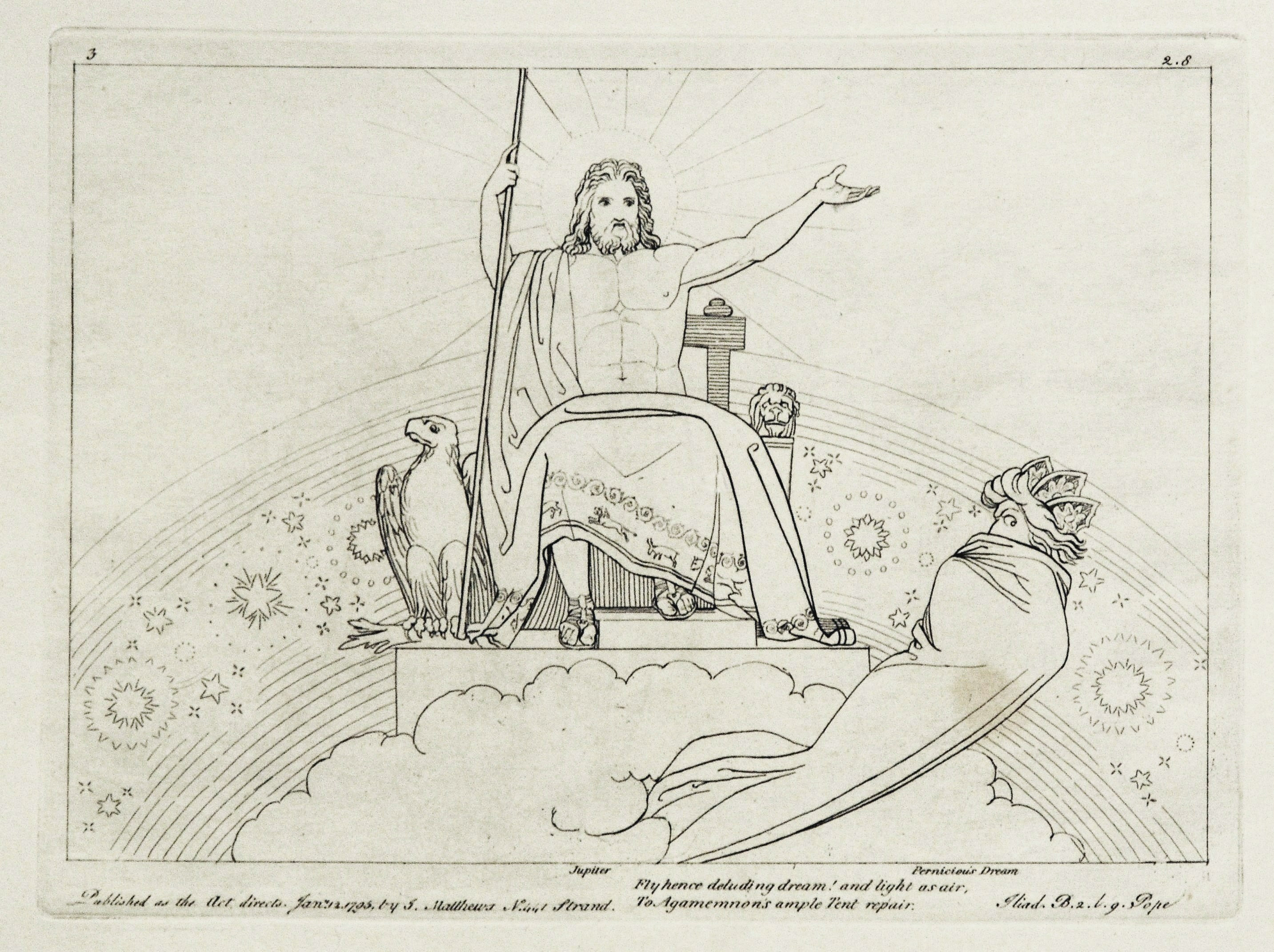 Kupferstich (1795) von Tommaso Piroli (1752 – 1824) nach einer Zeichnung (1793) von John Flaxman (1755 – 1826).